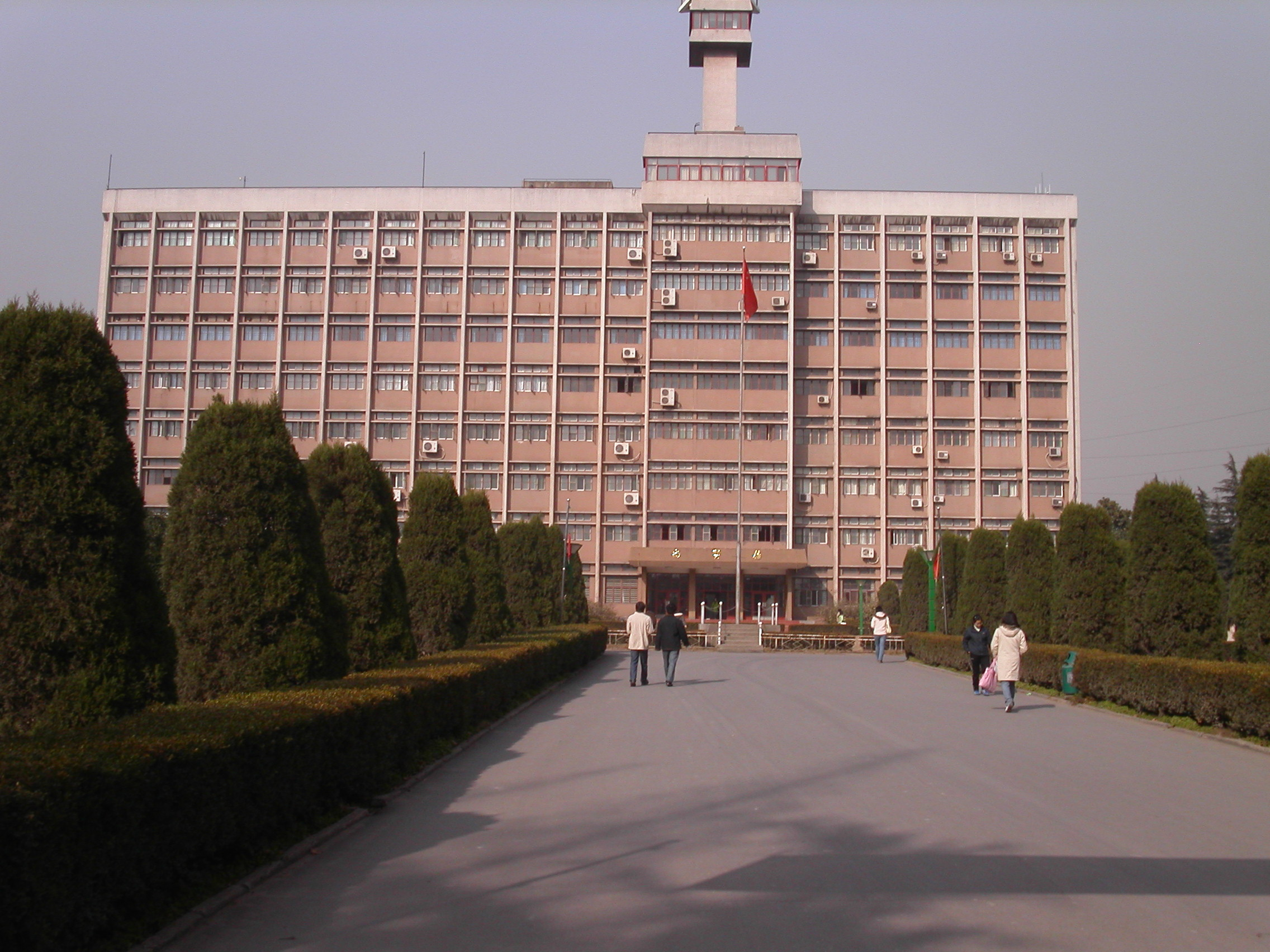 南京信息工程大学尚贤楼